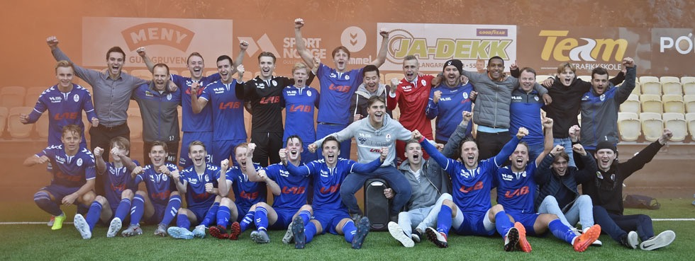 Her feirer Bjarg opprykket til 3. divisjon på Flaktveit Stadion